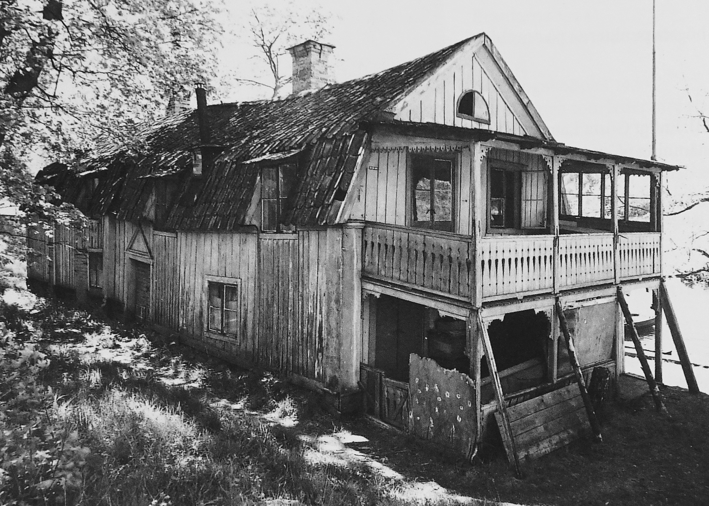 Pettersbergsgården strax före rivningen 1960